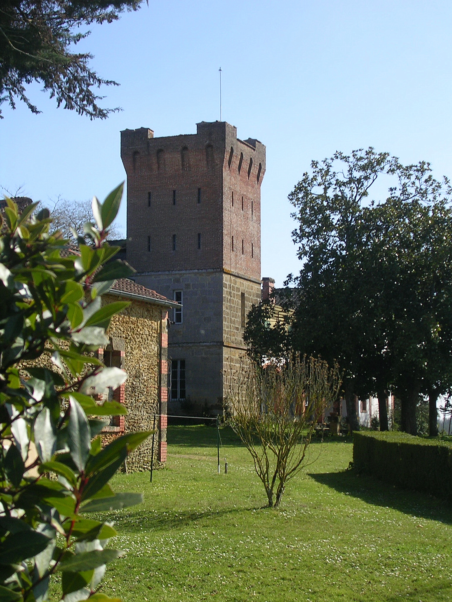 Château de Loubens à Hontanx, dans le département français des Landes